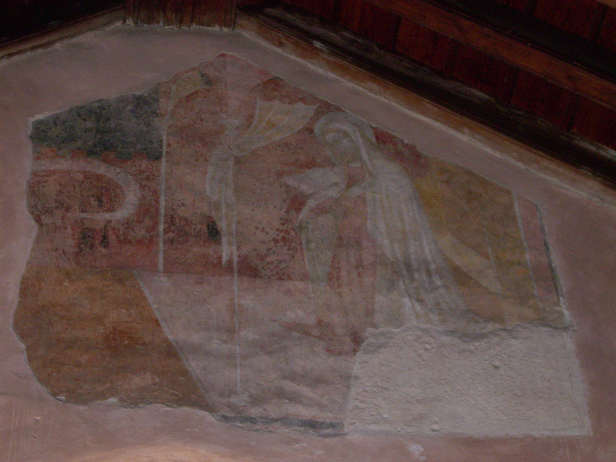 Loggia medievale di Levanto, Liguria, Italia